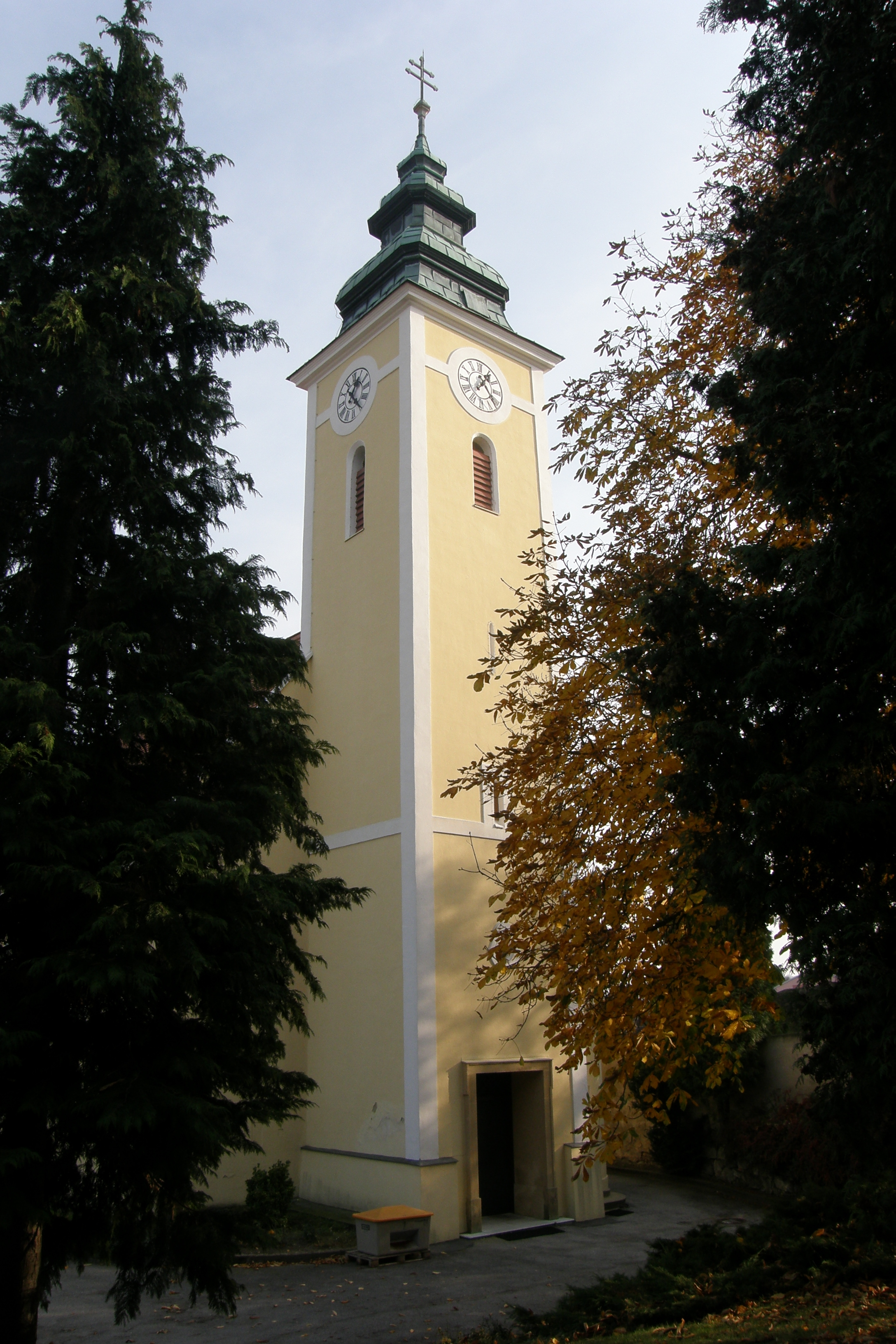 Kath. Pfarrkirche hl. Dorothea